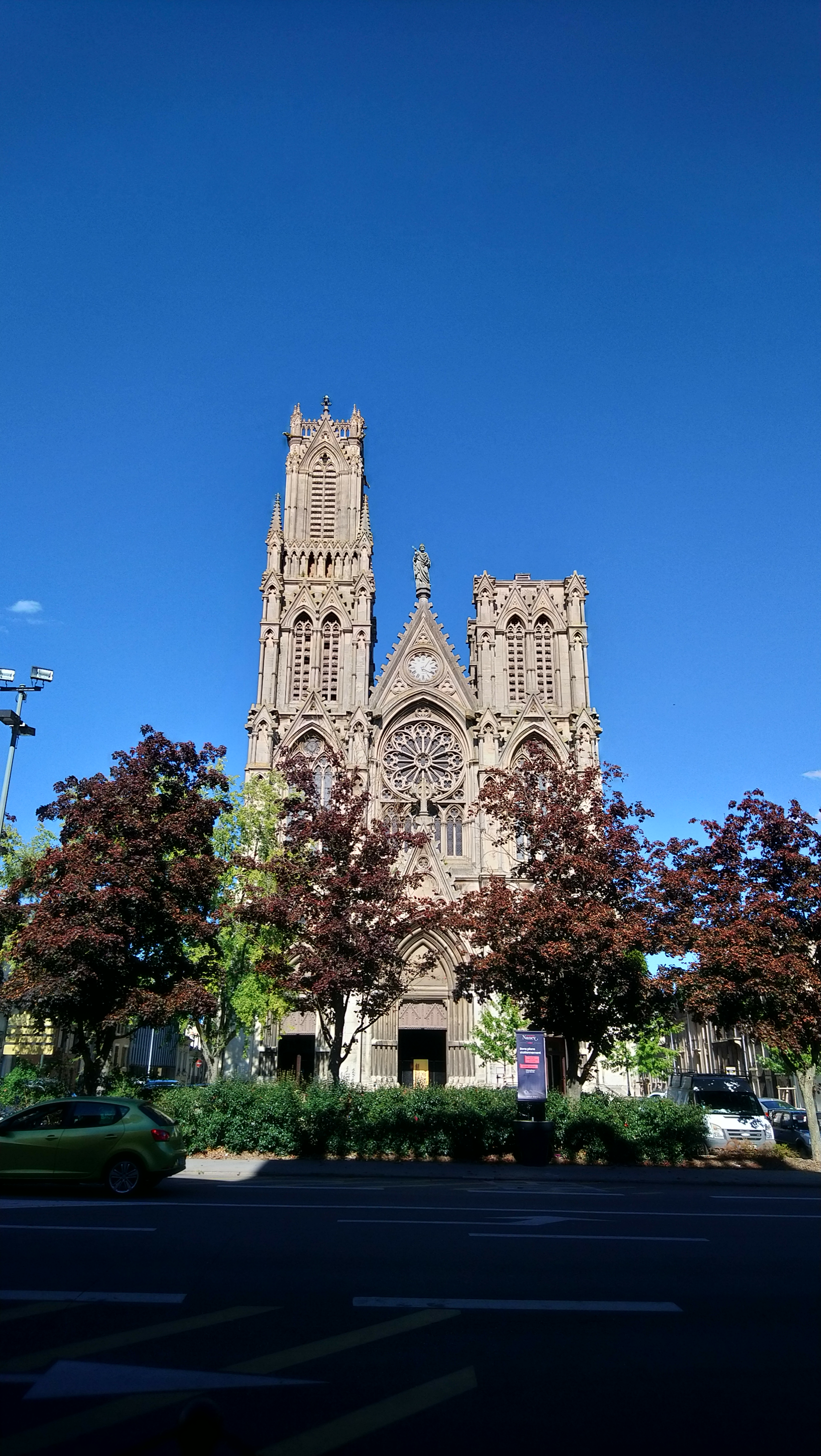 Façade principale de l'église Saint-Pierre à Nancy (54).